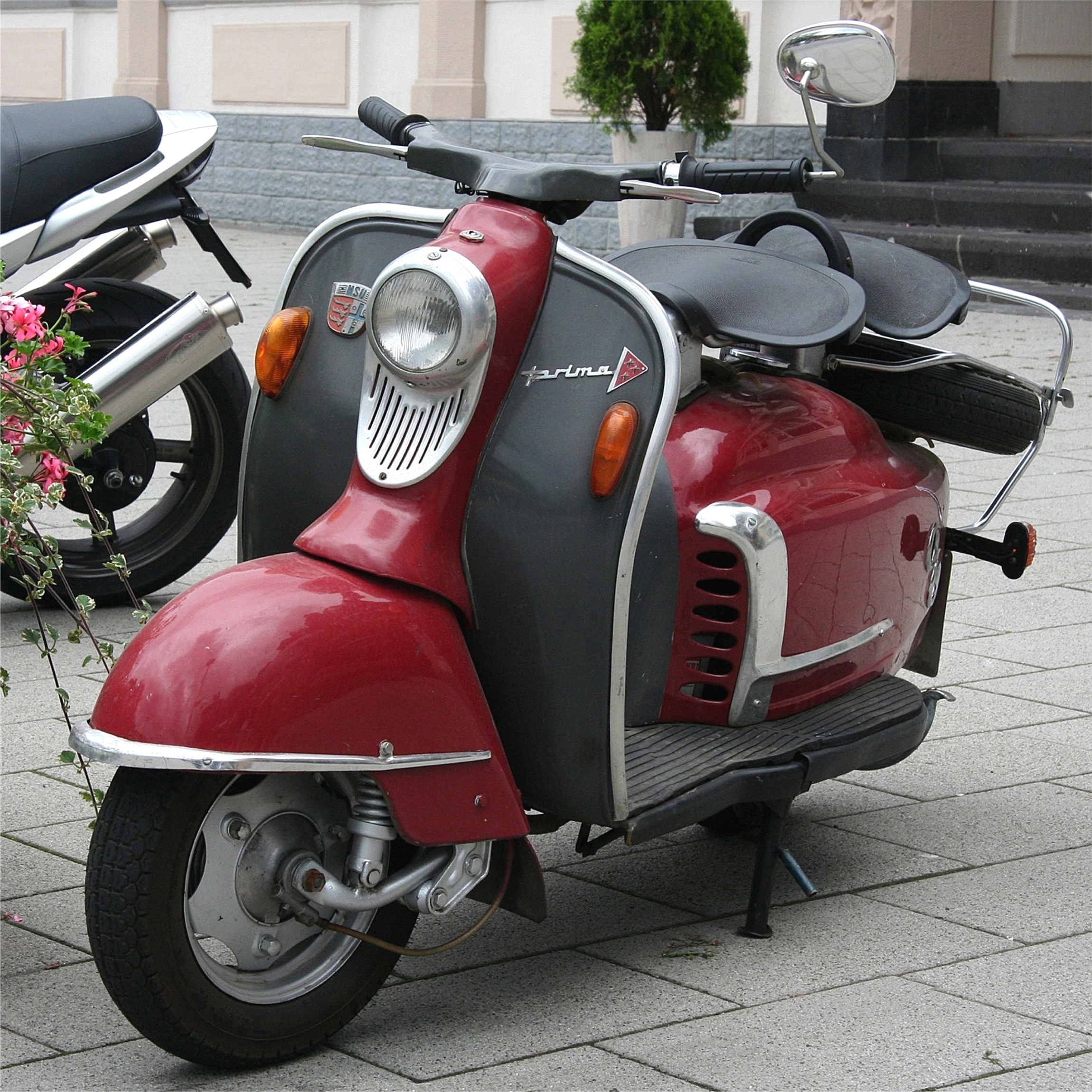 NSU Prima III K, Bauzeit 1958–1964 (Blinker nicht serienmäßig)